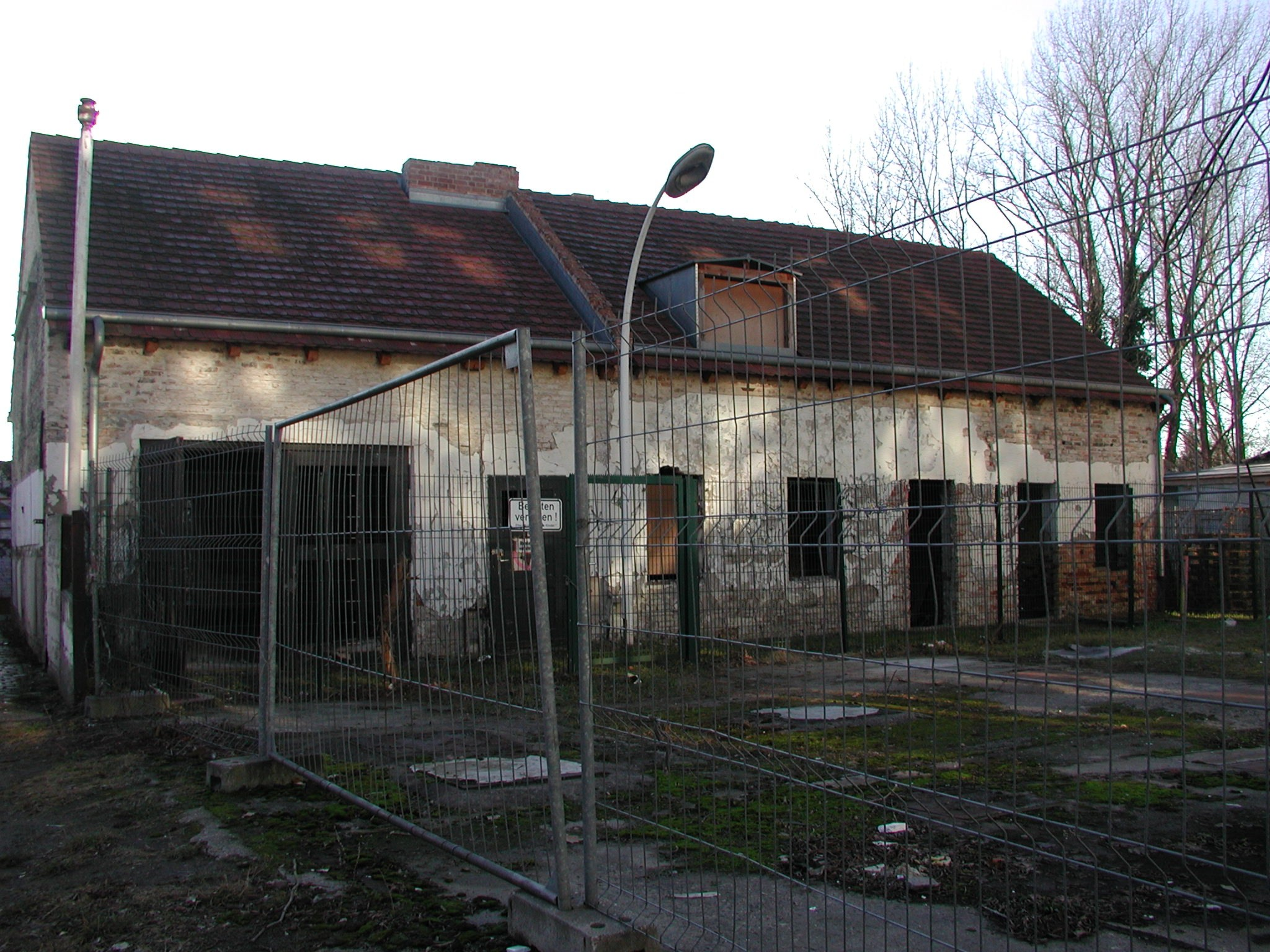 denkmalgeschütztes Kolonistenhaus in der Lückstraße